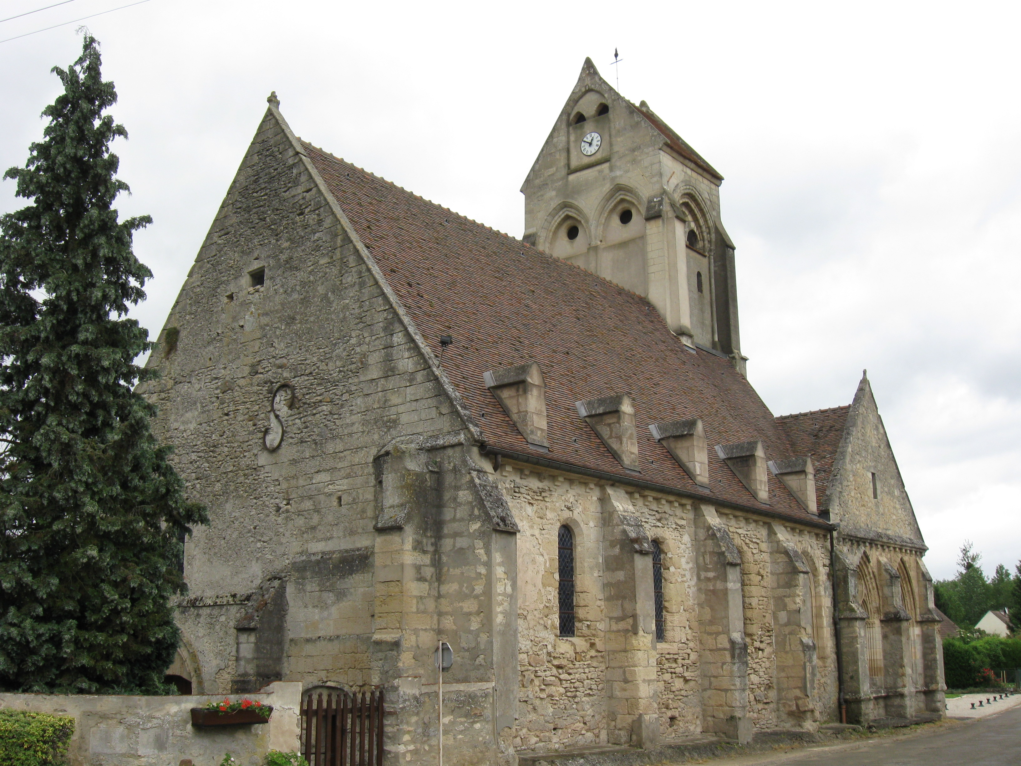 Église Notre-Dame-de-la-Nativité de Varinfroy. (département de l'Oise, région Picardie).